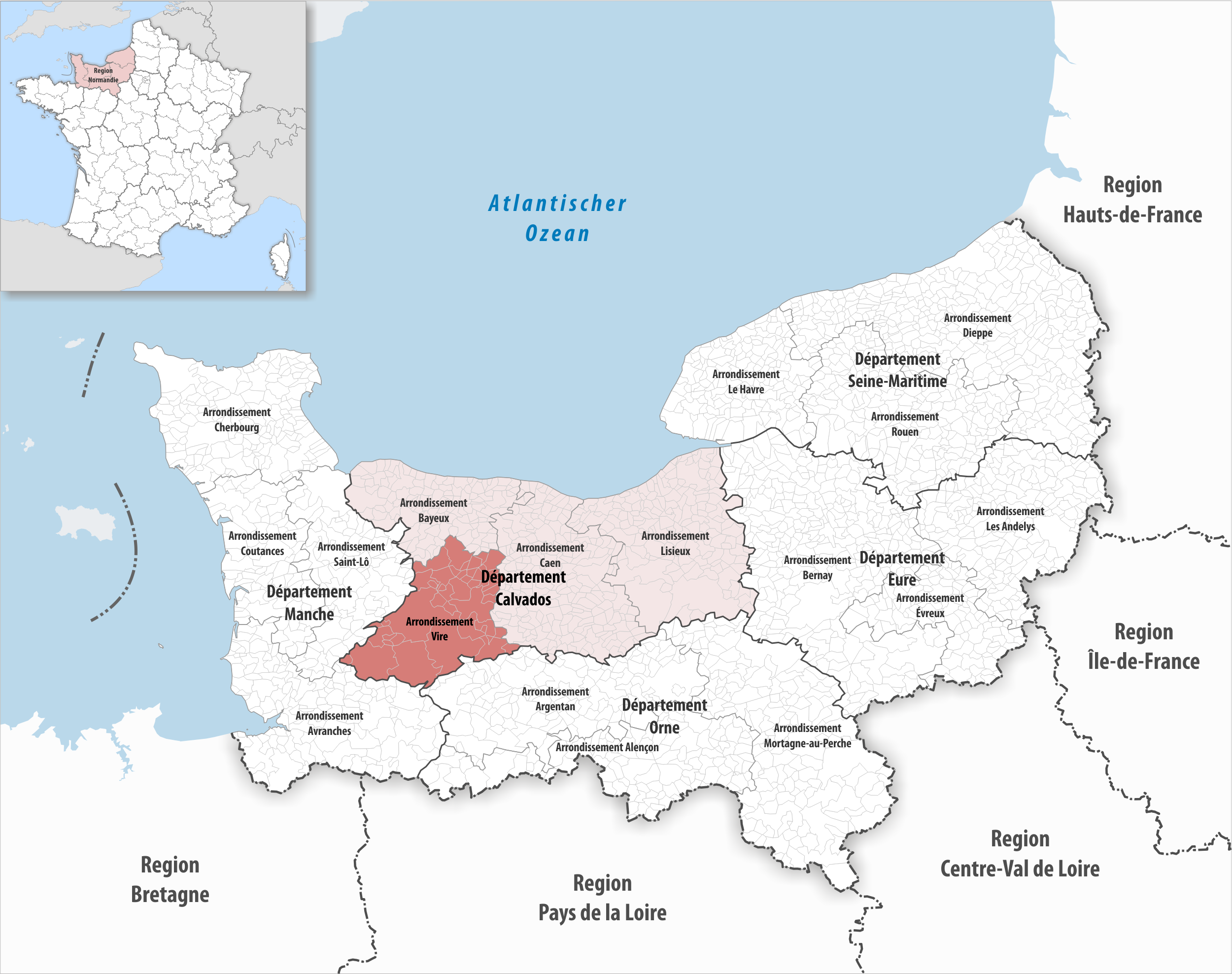 Lage des Arrondissements Vire